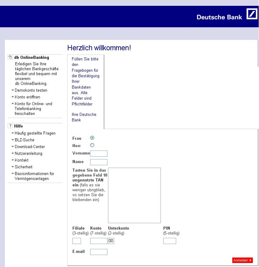 Screenshot einer Phishing-Webseite Die Webseite war darüber hinaus mit dem Virus Trojan-Spy.HTML.Citifraud.j infiziert.